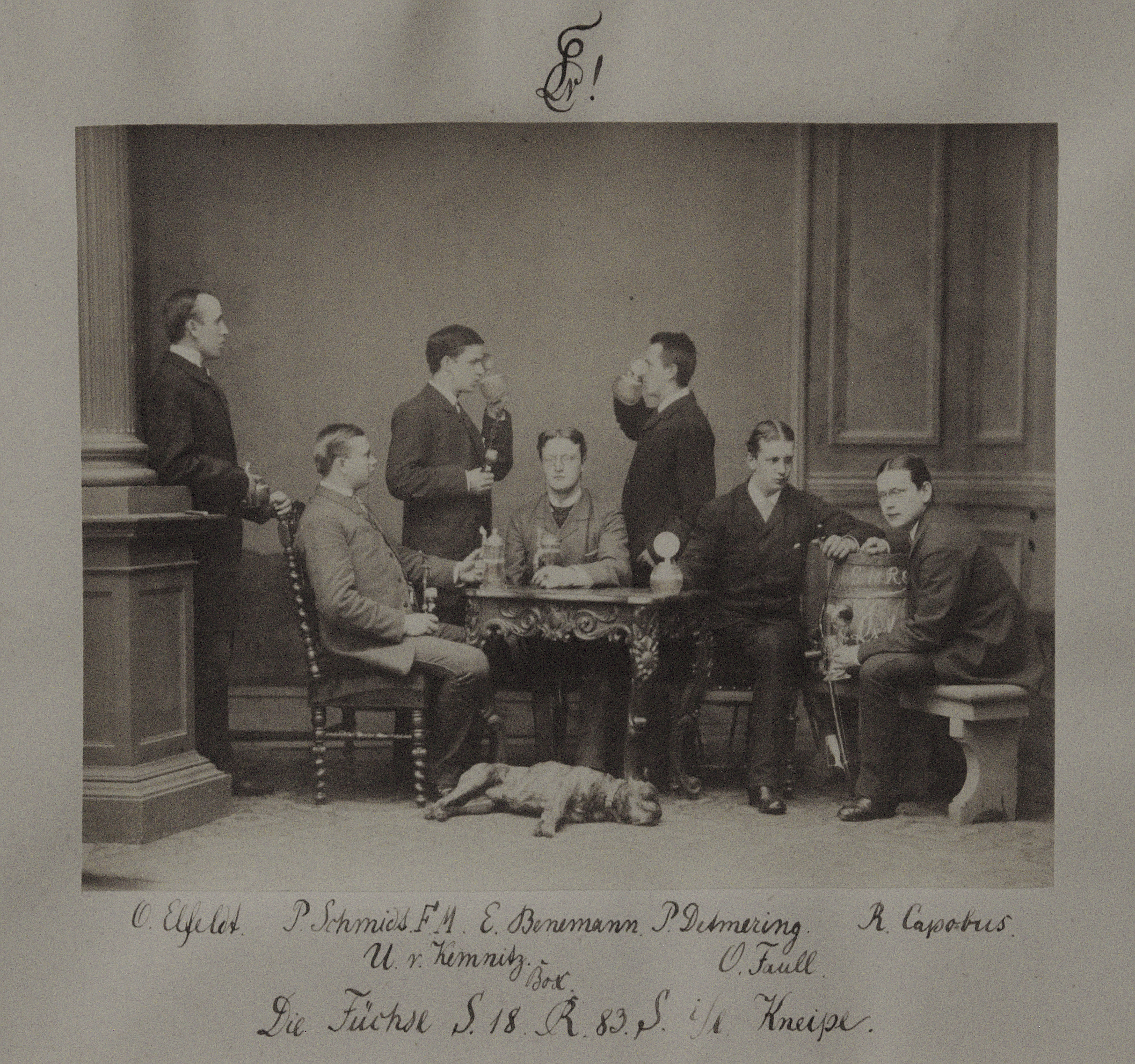 Die Fuxia der Studentenverbindung Leonensia im Sommersemester 1883